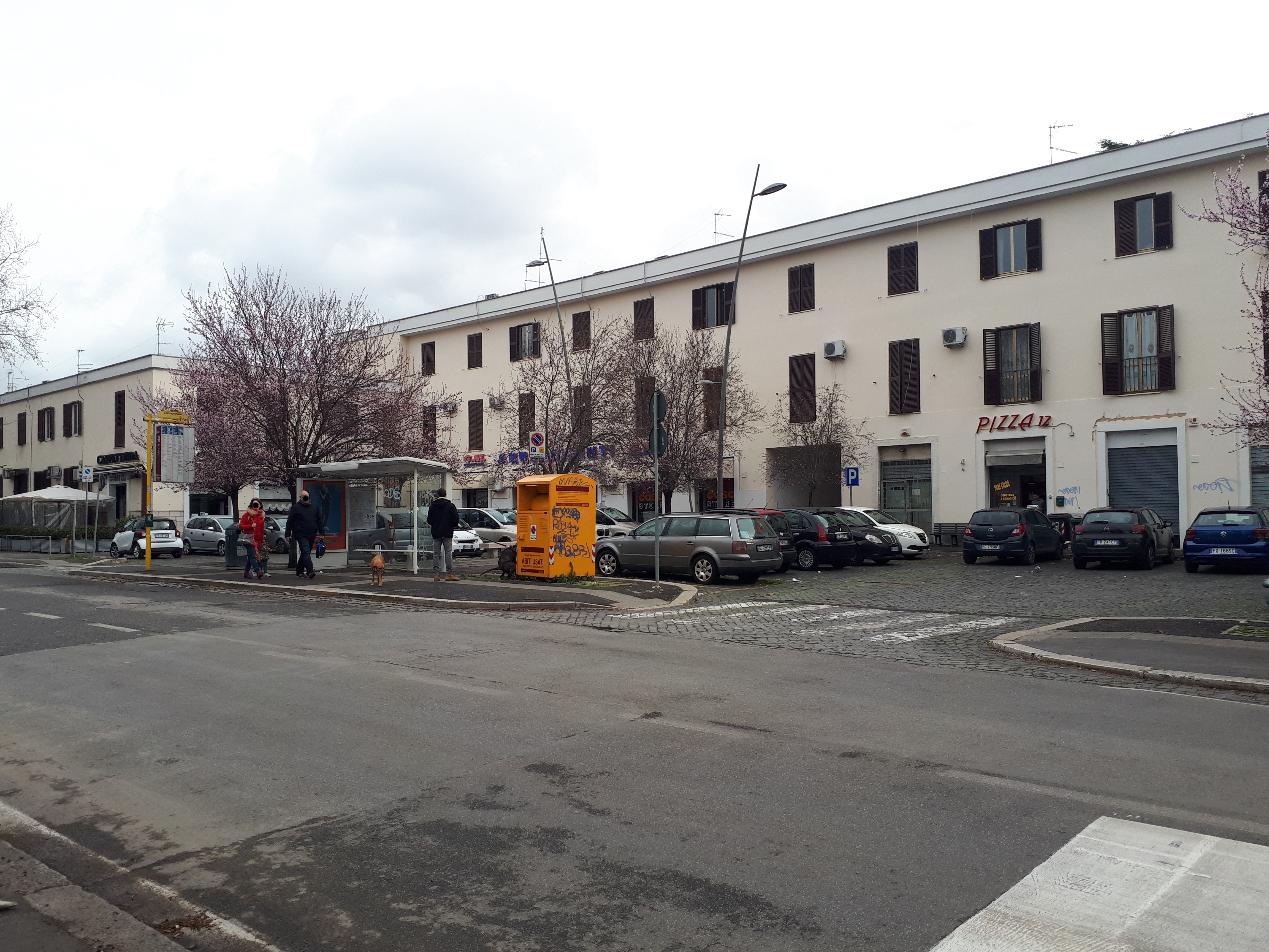 Largo Federigo Borromeo, Primavalle, Roma